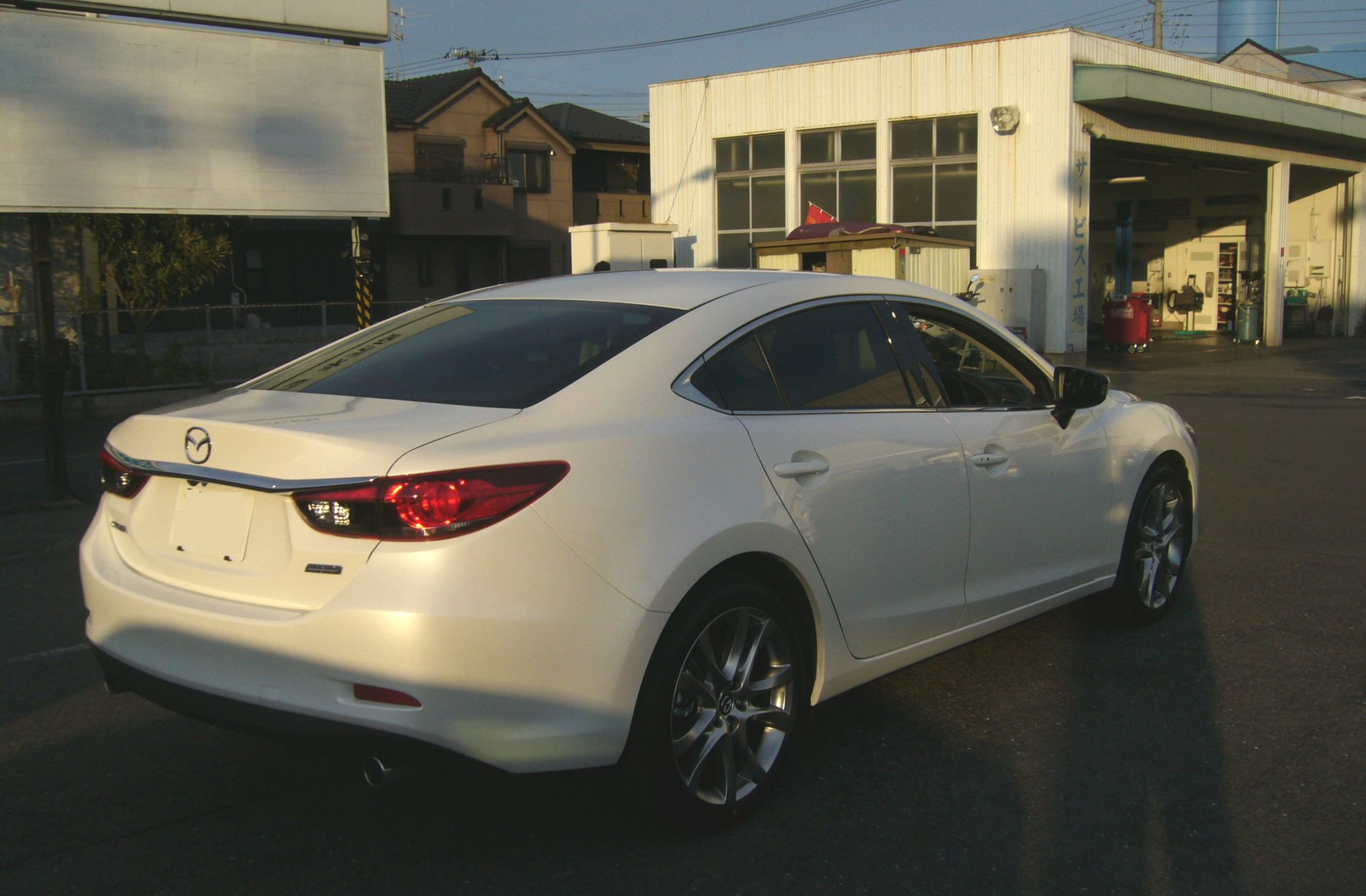 マツダ・アテンザ